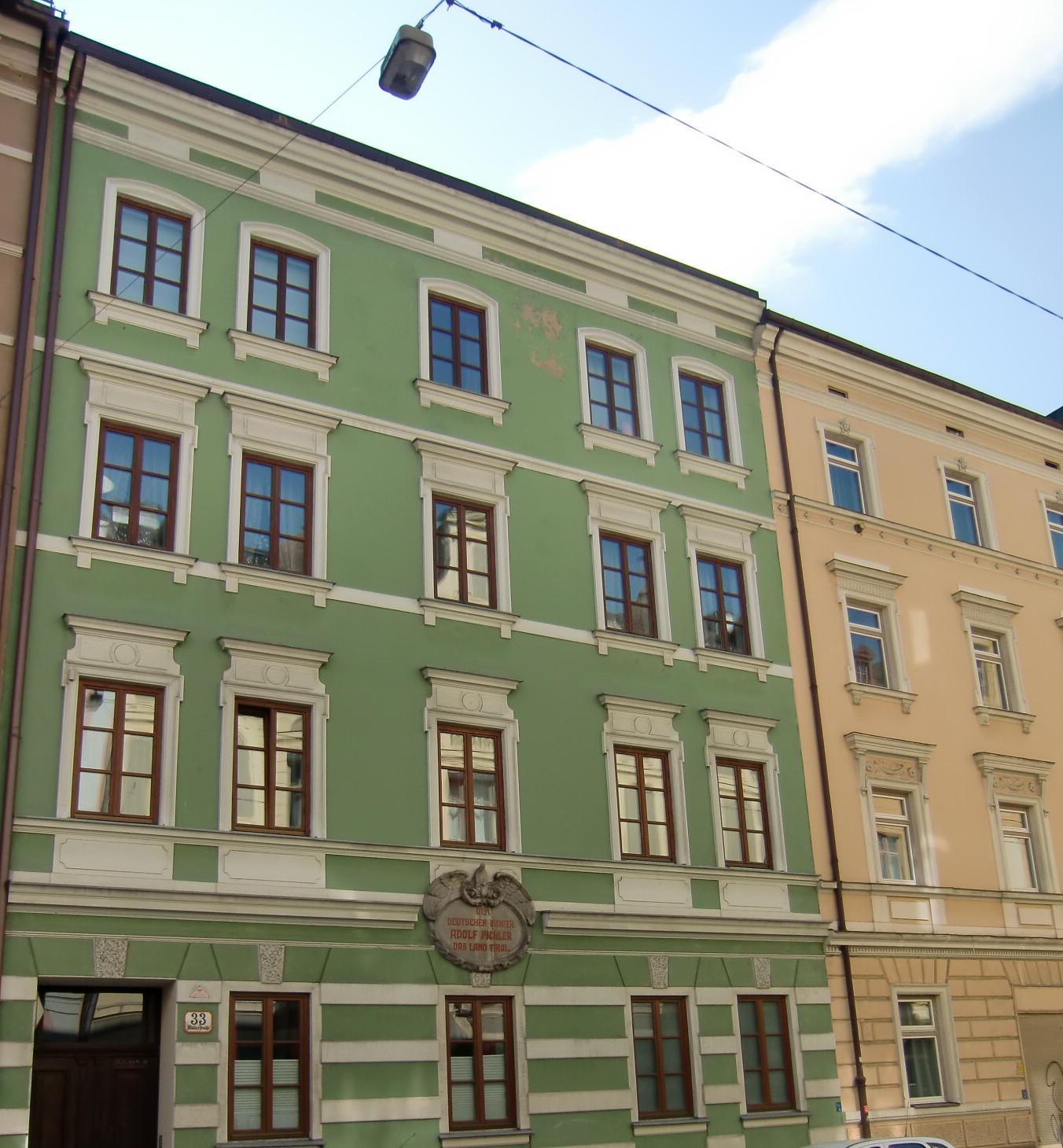 Wohnhaus von Adolf Pichler in der Müllerstraße 33 in Innsbruck-Wilten This media shows the remarkable cultural object in the Austrian state of Tyrol listed by the Tyrolean Art Cadastre with the ID 68545. (on tirisMaps, pdf, more images on Commons)